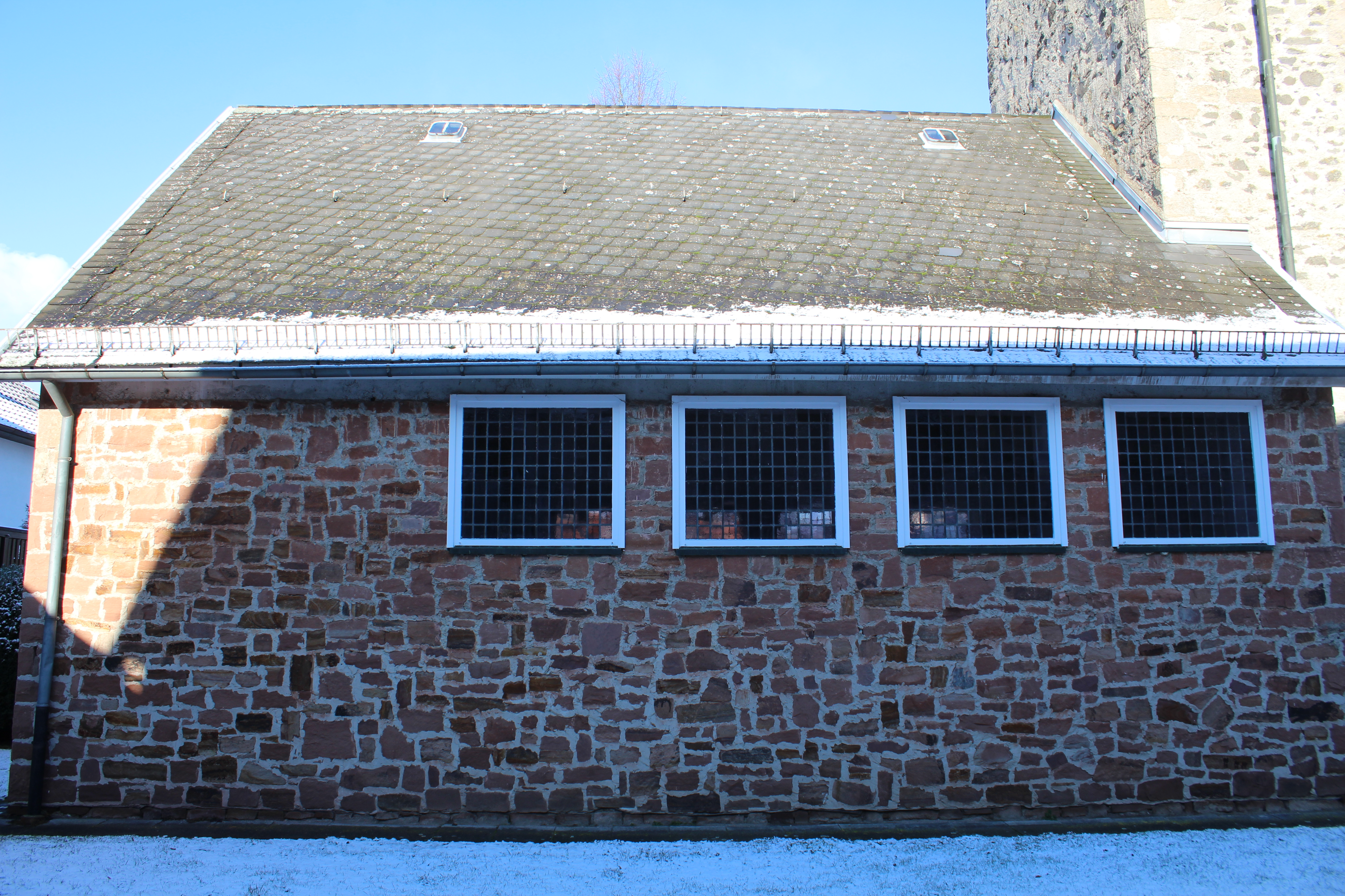 Evangelische Kirche Leidenhofen, Gemeinde Ebsdorfergrund, Landkreis Marburg-Biedenkopf, Hessen, Deutschland